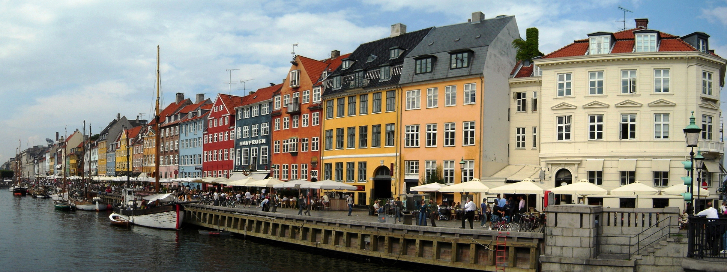 Nyhavn in Copenhagen